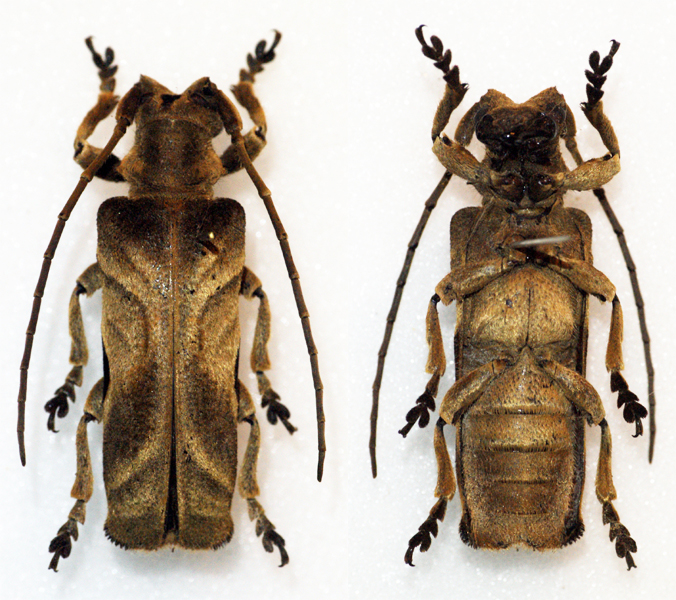 Gahan,1890 Sex: Female Data: 03-2013 - Sefula Forest - Zambia Size: ?